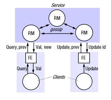 Esquema arquitectura cotilla